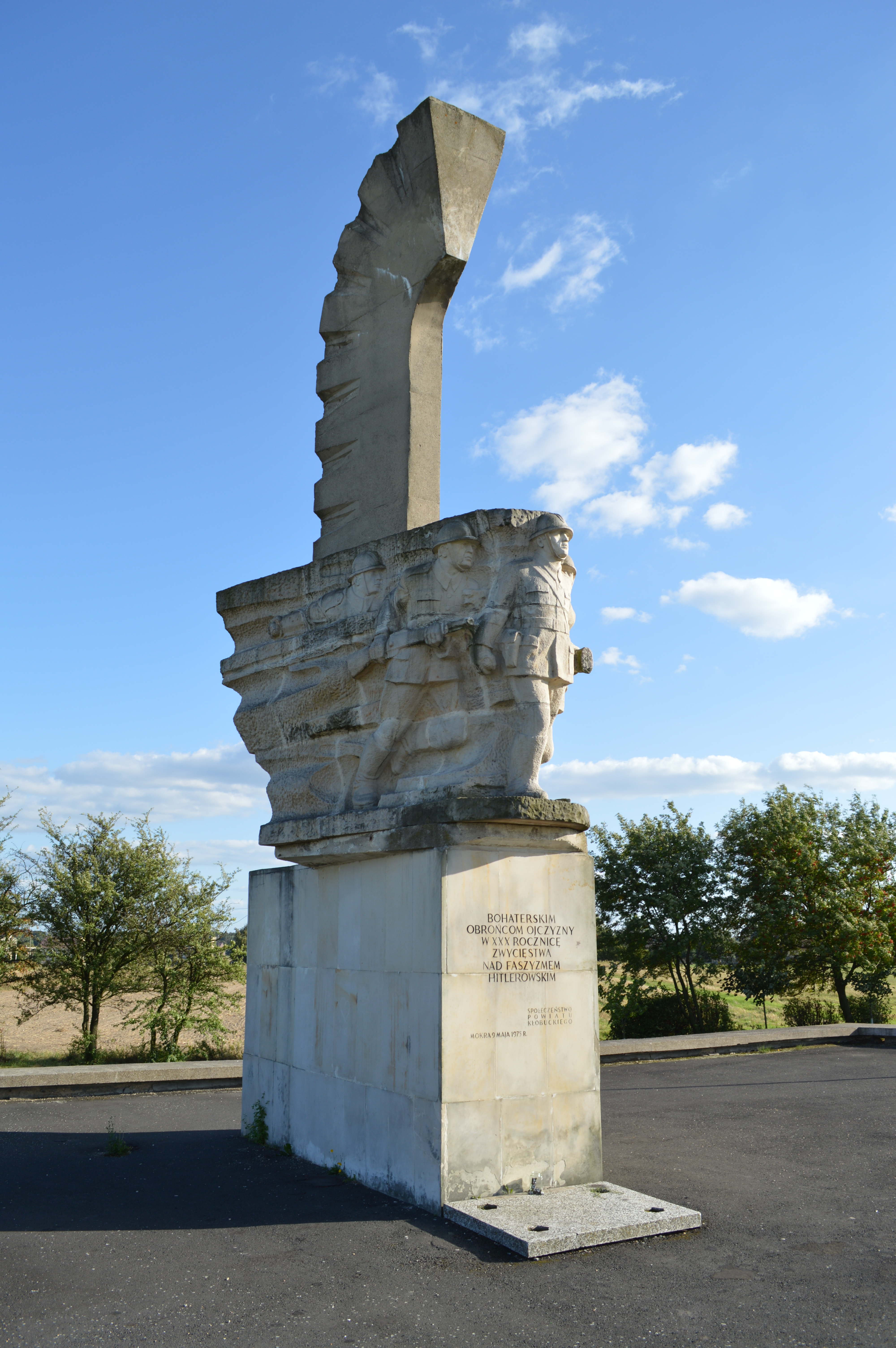 Pomnik Wołyńskiej Brygady Kawalerii w Mokrej